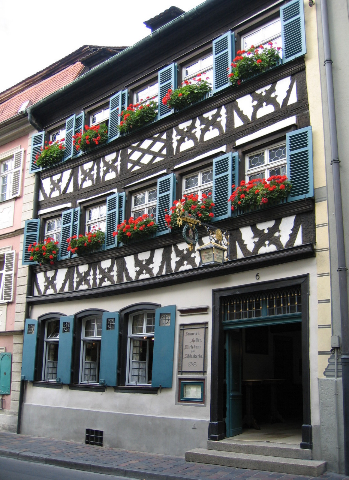 Description: Brauerei Heller: Wirtshaus zum "Schlenkerla" in Bamberg (Germany) Source: selbst fotografiert Date: 9. Sept. 2005 Author: Asio otus